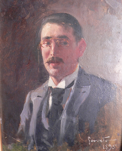 Retrat de Francesc Mestre i Noè, quadre d'Antoni Serveto, 1895